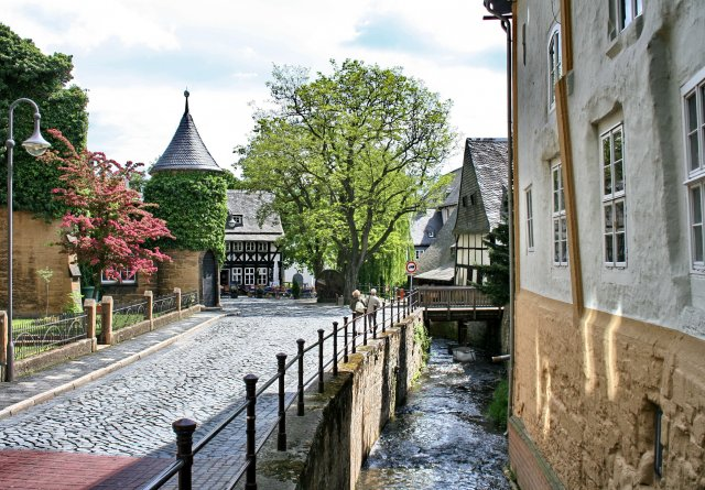 Innenstadt von Goslar. Die Abzucht.